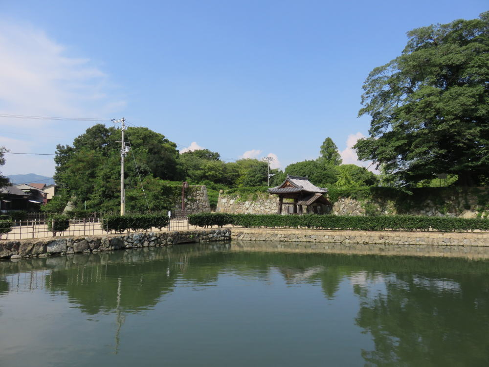 姫路城中曲輪、清水門の石垣。